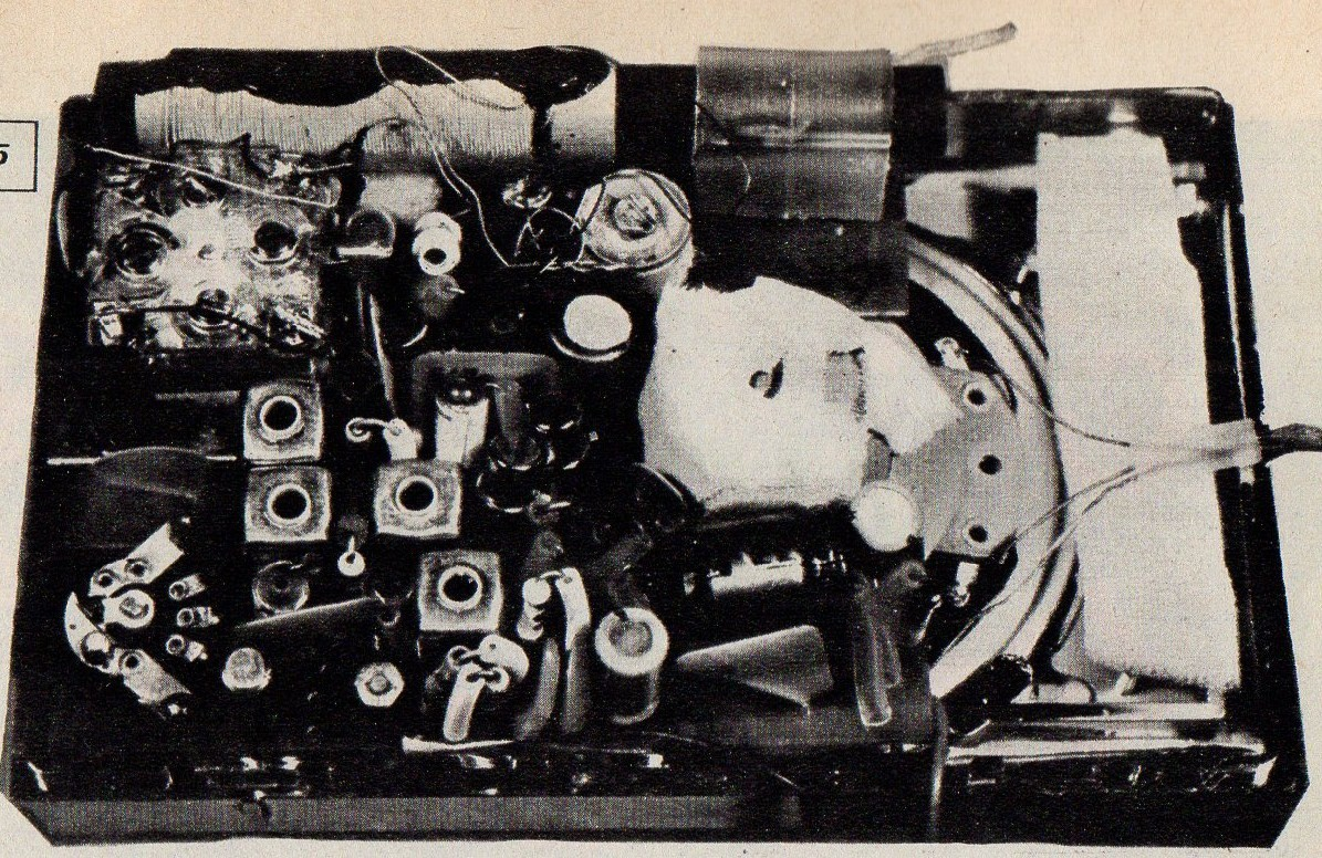 Radio Szarotka.